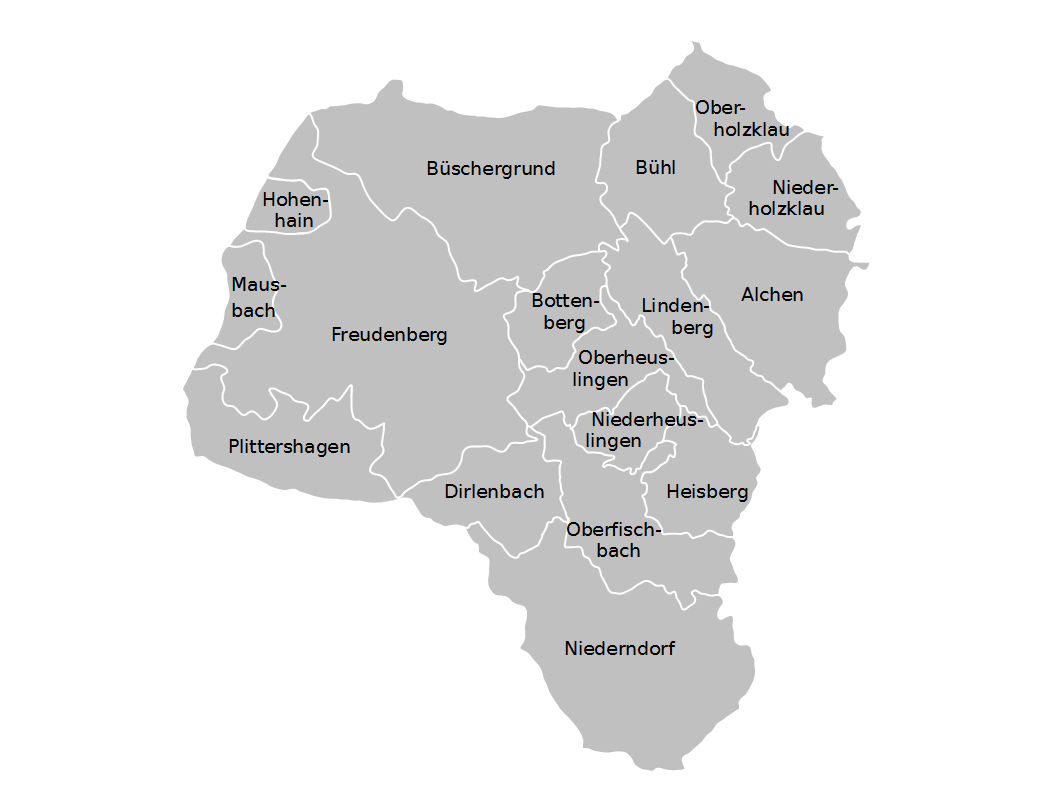 Politische Gliederung der Stadt Freudenberg (Siegerland).